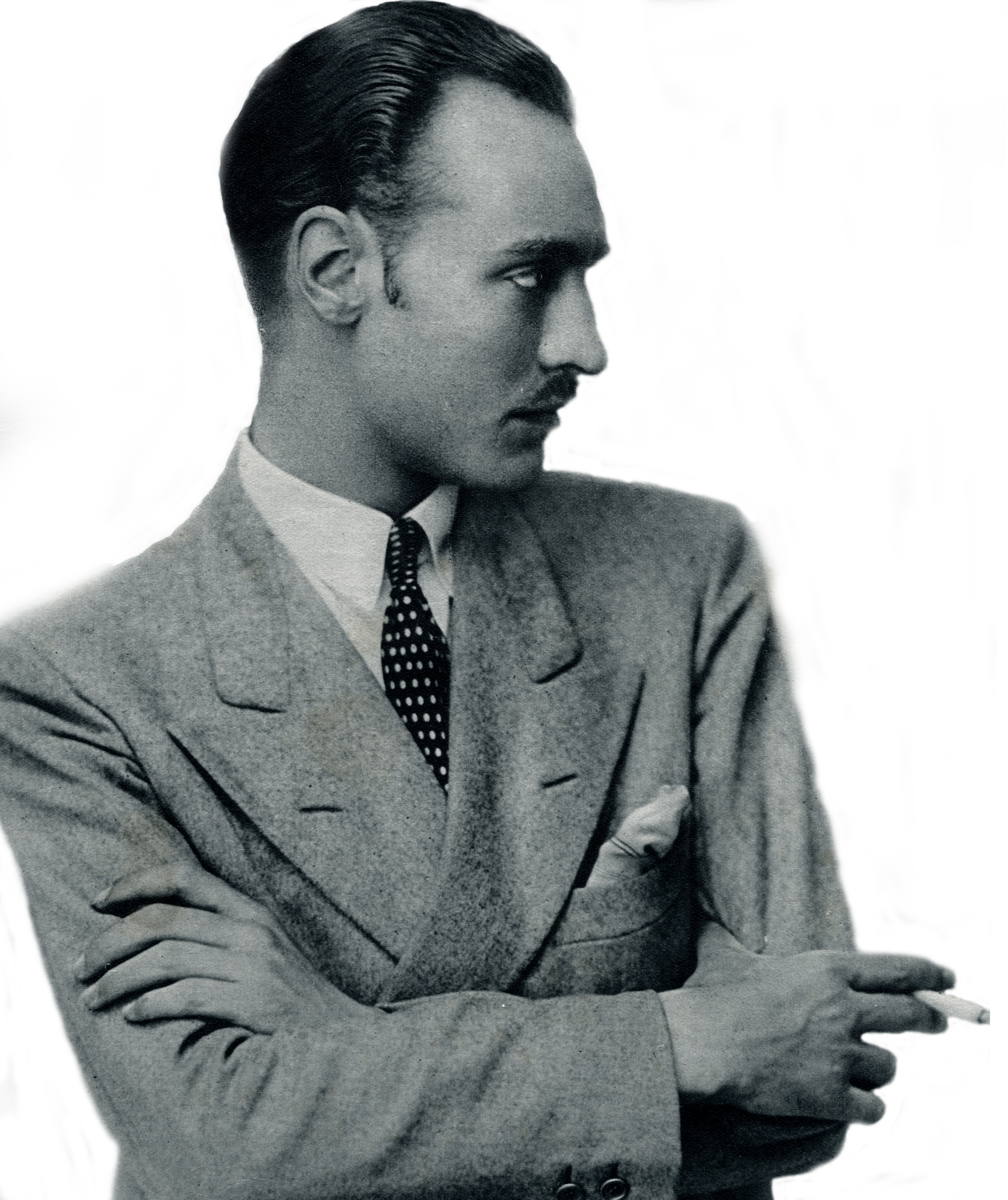 Giorgio Bianchi , attore e regista italiano (1904 - 1967) - Foto del 1929